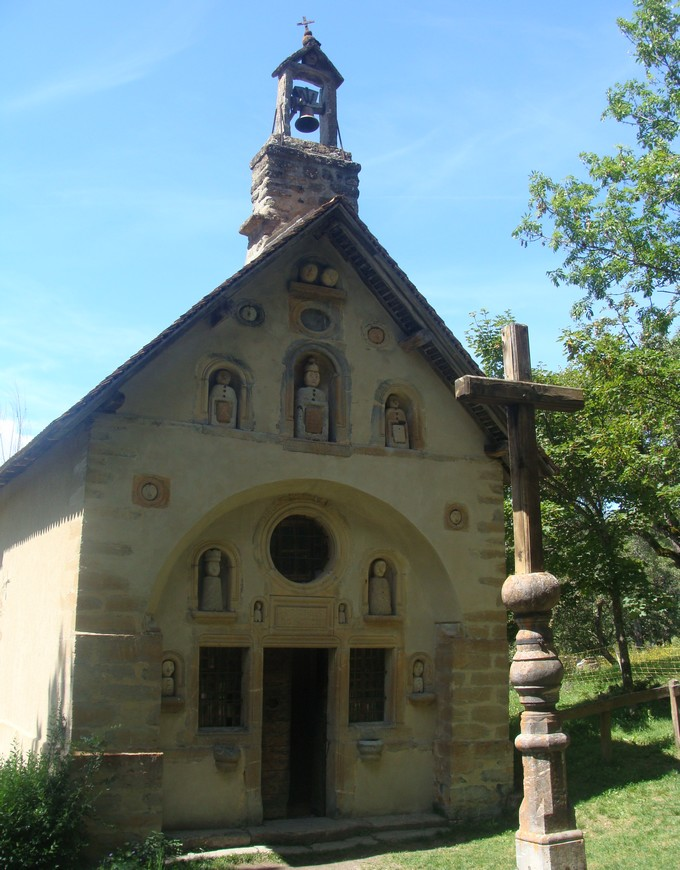 La chapelle des Pétètes, à l'Aubérie, commune Bénévent-et-Charbillac (Hautes-Alpes), vue extérieure.